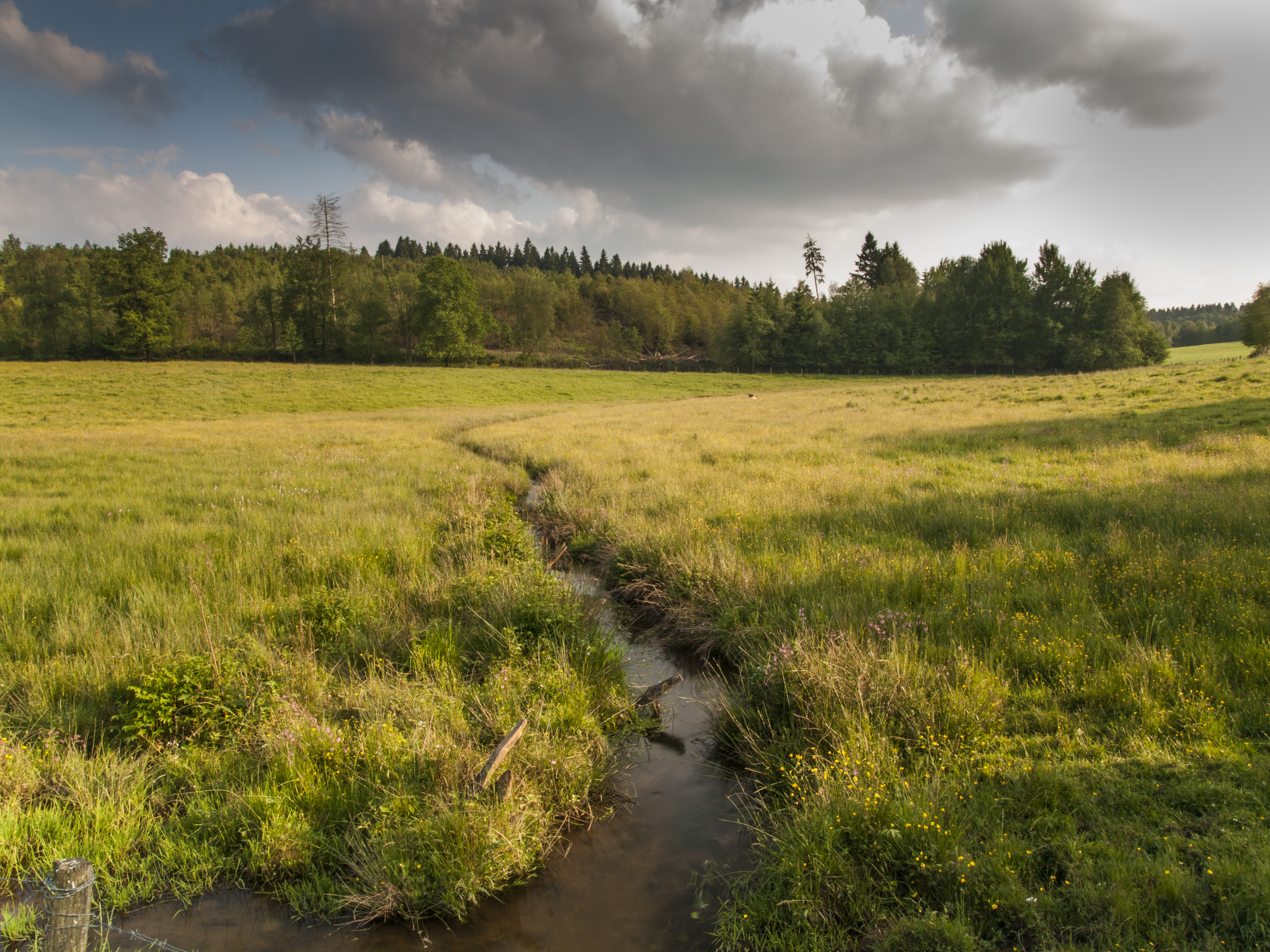 Die Bigge im Naturschutzgebiet „Biggequellgebiet“ in Nordrhein-Westfalen